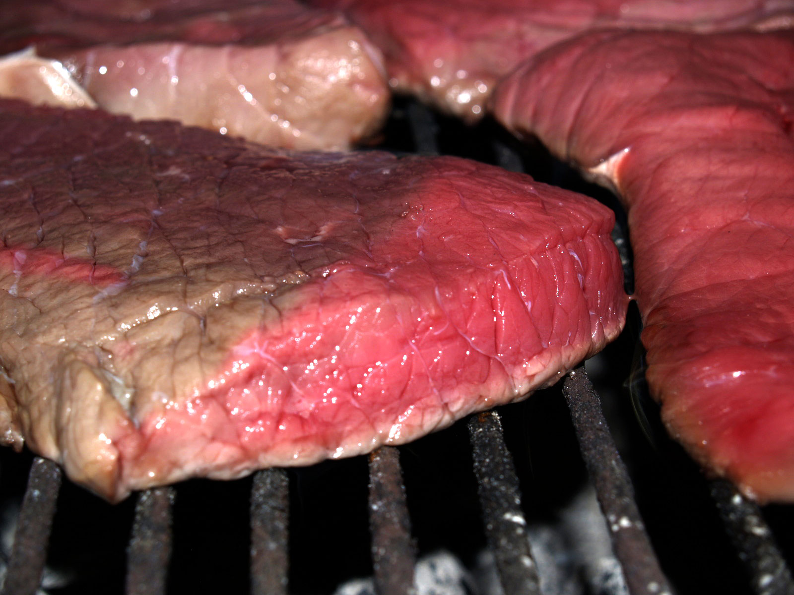 Bøf